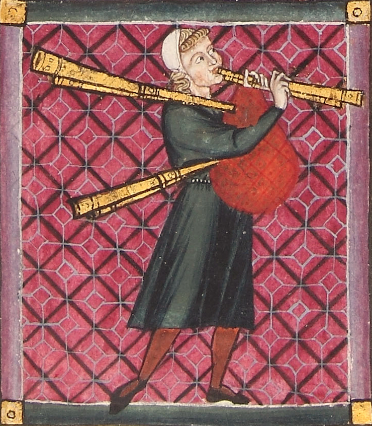 Dudelsack/Sackpfeife aus den Cantigas de Santa Maria, mit gedoppelter Spielpfeife und zwei gedoppelten Bordunen, Cantiga 340